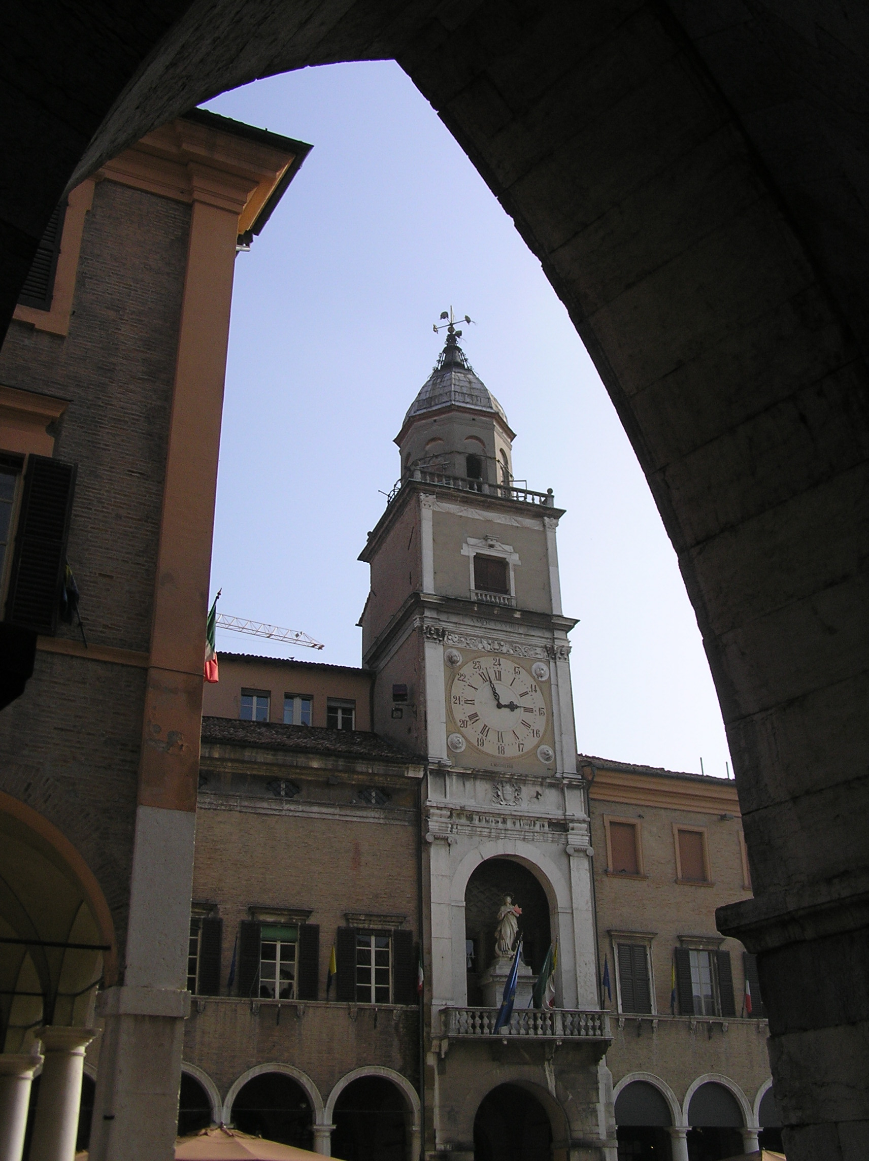 Palazzo Comunale di Modena da arco gotico di Via Lanfranco.